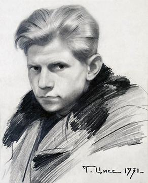 Григорий Иванович Цисс. "Мужской портрет" (1931)